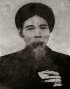 Chân dung Nguyễn Khuyến